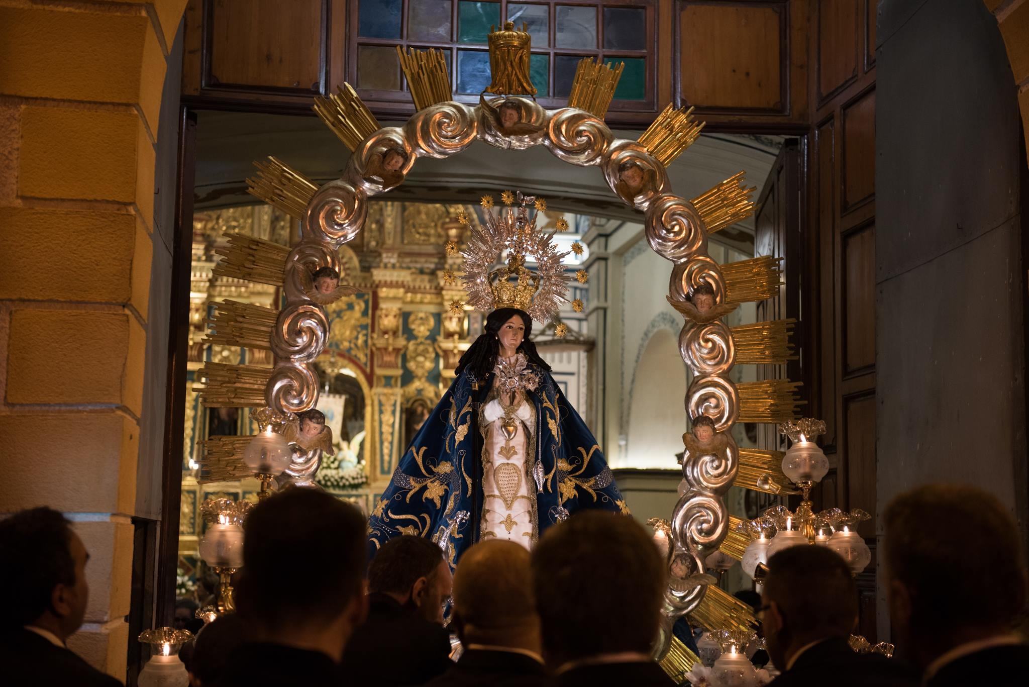 La Purísima saliendo de su Santuario